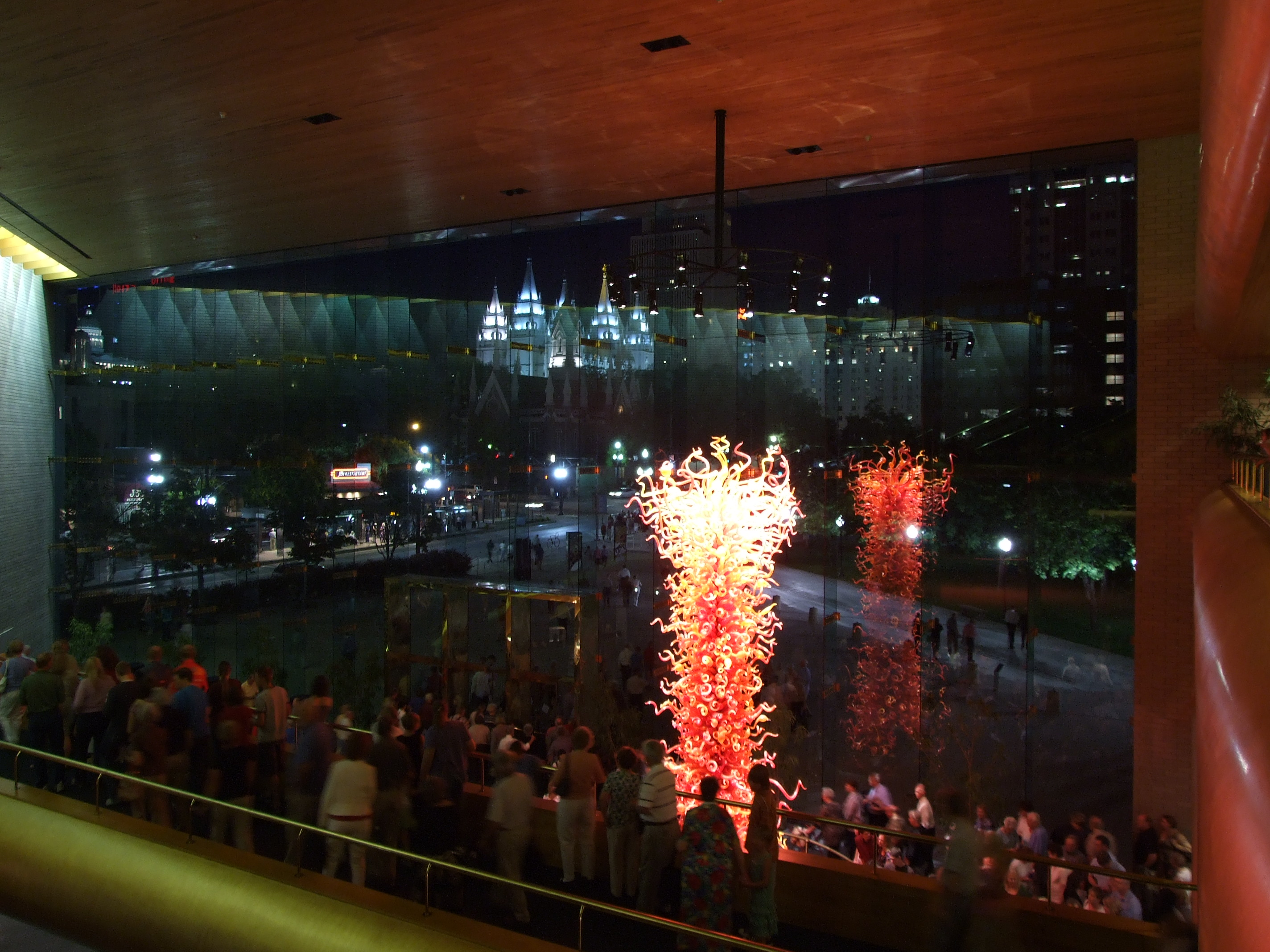 Abravanel Hall interior, night